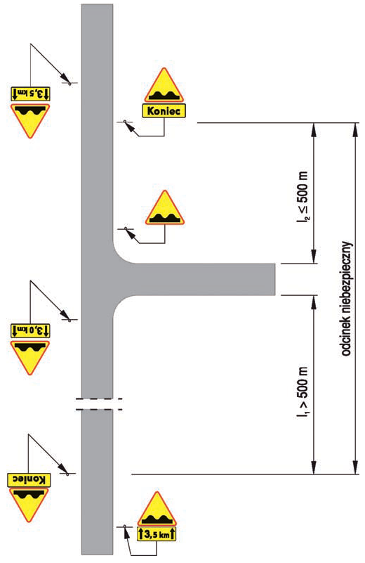 Ilustracja oznakowania odcinka niebezpiecznego drogi znakami ostrzegawczymi i tabliczkami T-2/T-3.